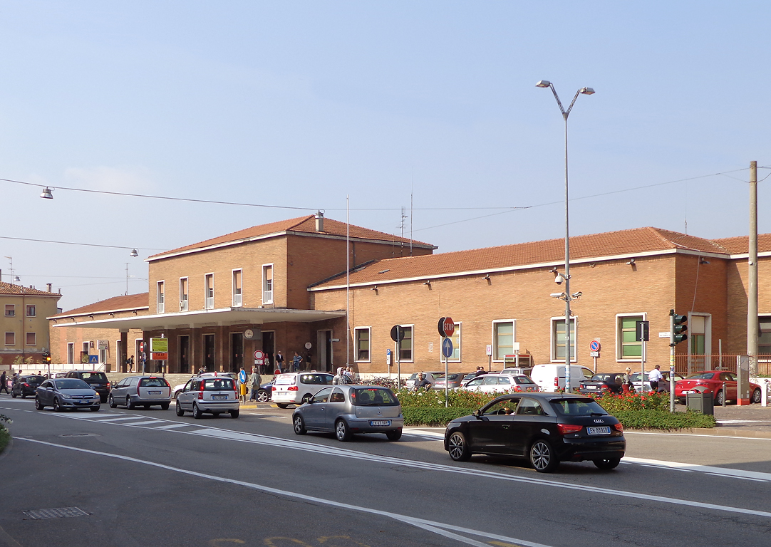 Stazione ferroviaria di Mantova